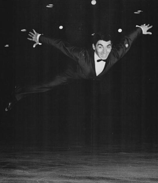 Robert Dureville Zentralbild Studré 14.11.1964 Berlin: Internationaler Verbandspokal des DELV Am 13.11.1964 fielen im internationalen DELV-Pokalwettbewerb in der Berliner Werner-Seelenbinder-Halle die ersten Entscheidungen. Die Pokale konnten Irene Müller-Hans-Georg Dallmer (DDR) beid den Paaren und Robert Durevills (Frankreich) bei den Herren entgegennehmen. UBz: Calmat-Nachfolger Robert Dureville (Frankreich) behauptete seinen ersten Platz aus der Pflicht.